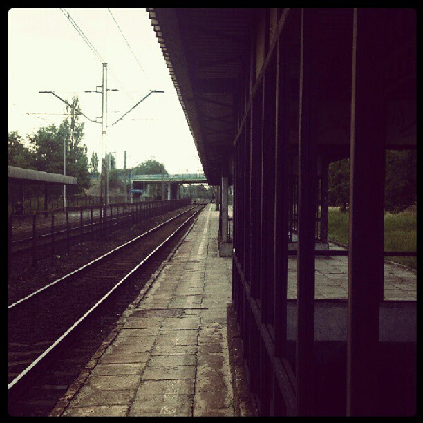 Train station Zabieniec in Lodz town